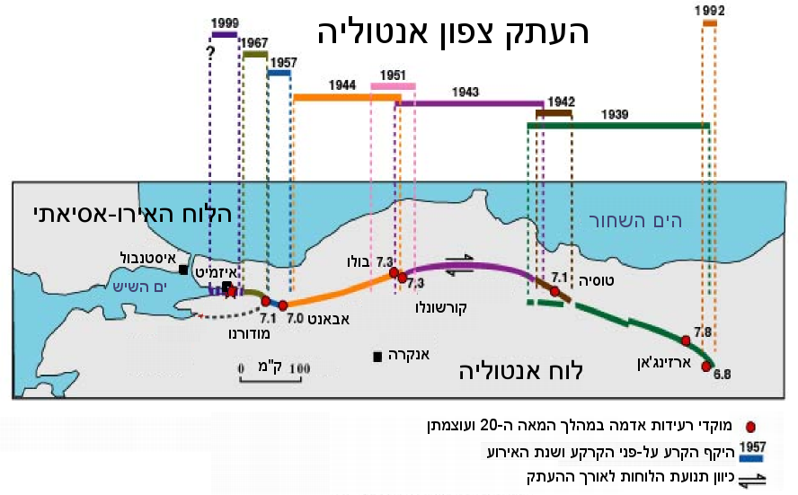 העתק צפון אנטוליה